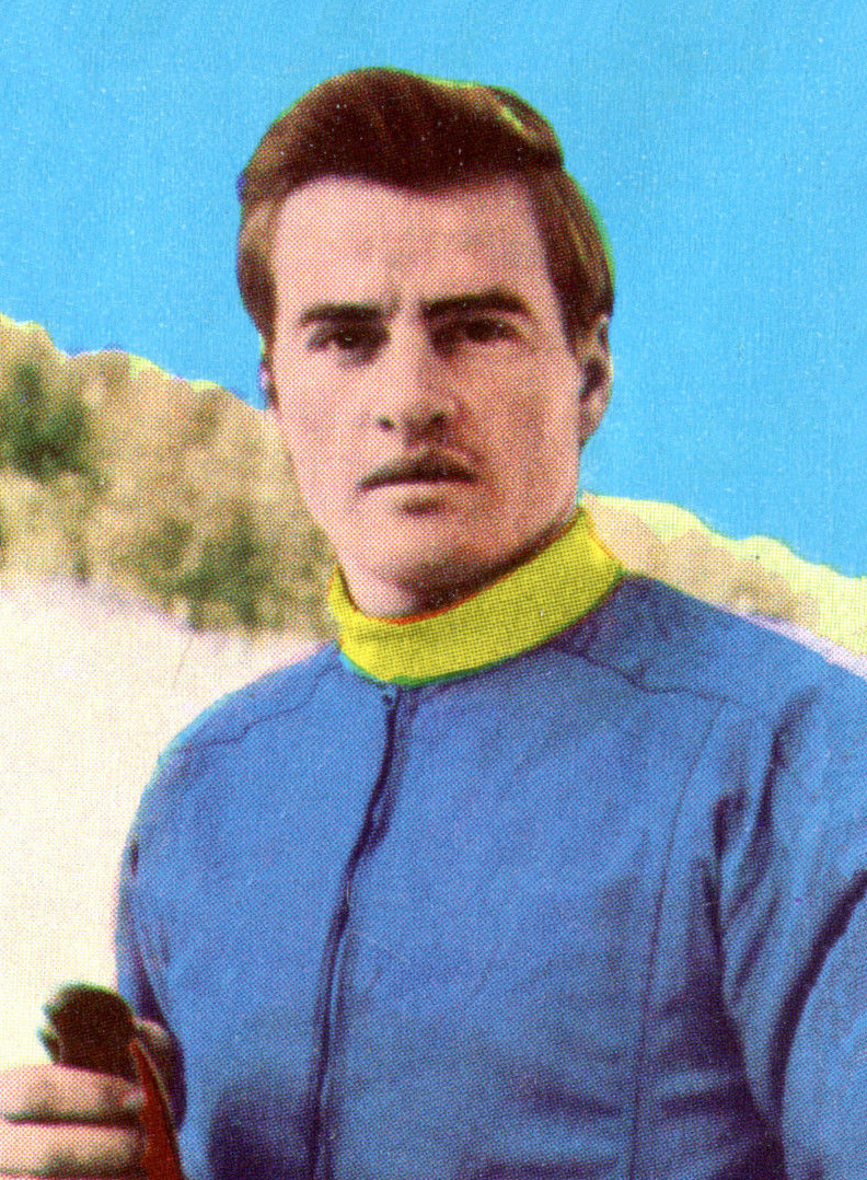 Figurina/Sticker CAMPIONI DELLO SPORT 1967/68-n. 506 - DE NICOLO - SCI -rec